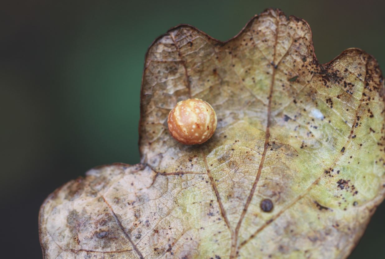 Gestreifte Eichengallwespe (Cynips longiventris); Galle der Wintergeneration an einem heruntergefallenen Blatt einer Stieleiche (Quercus robur) am 19. November 2019 in einem Wald nahe Walldorf/Baden